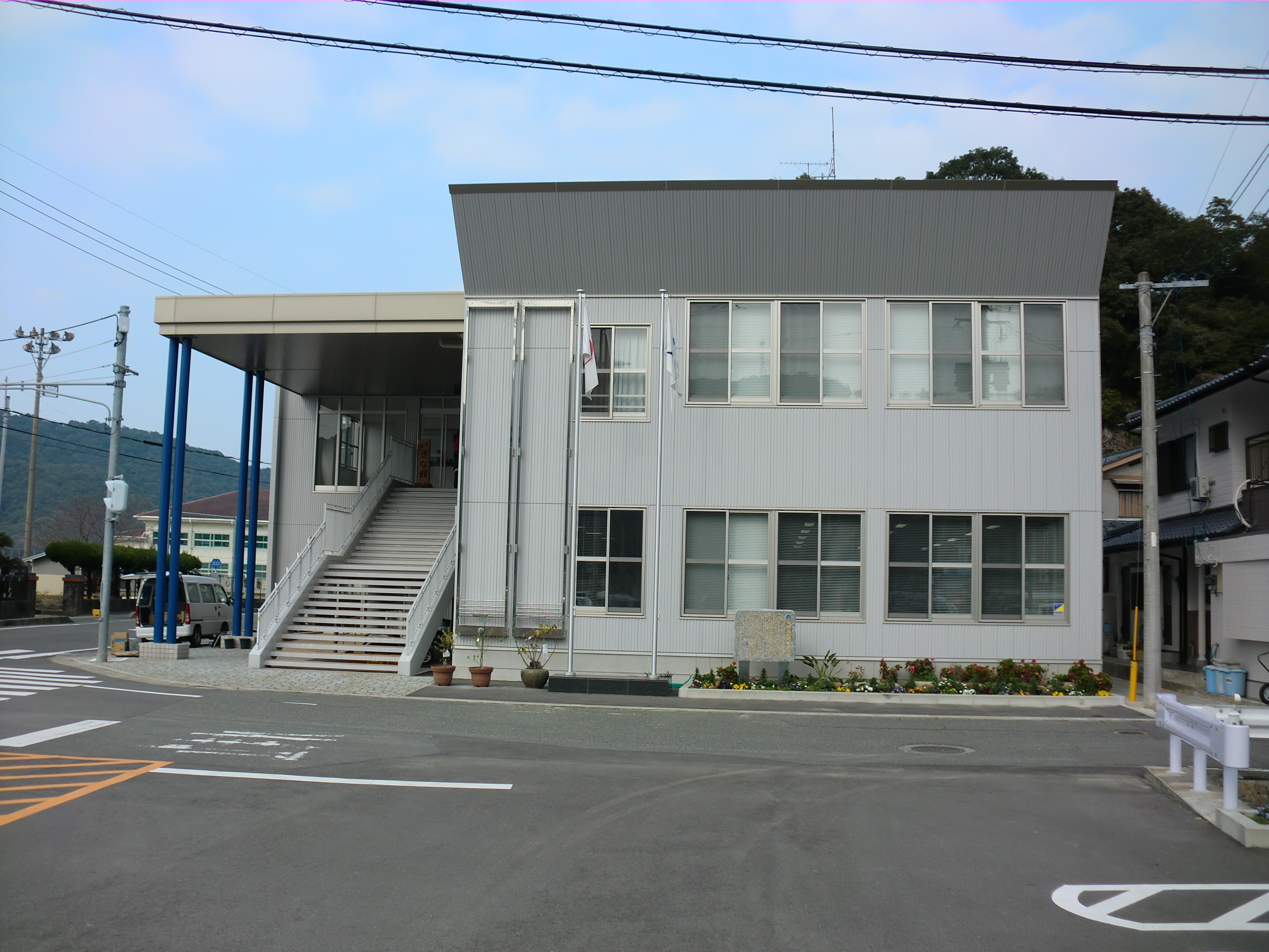 熊本県天草市にある天草市役所御所浦（ごしょうら）支所